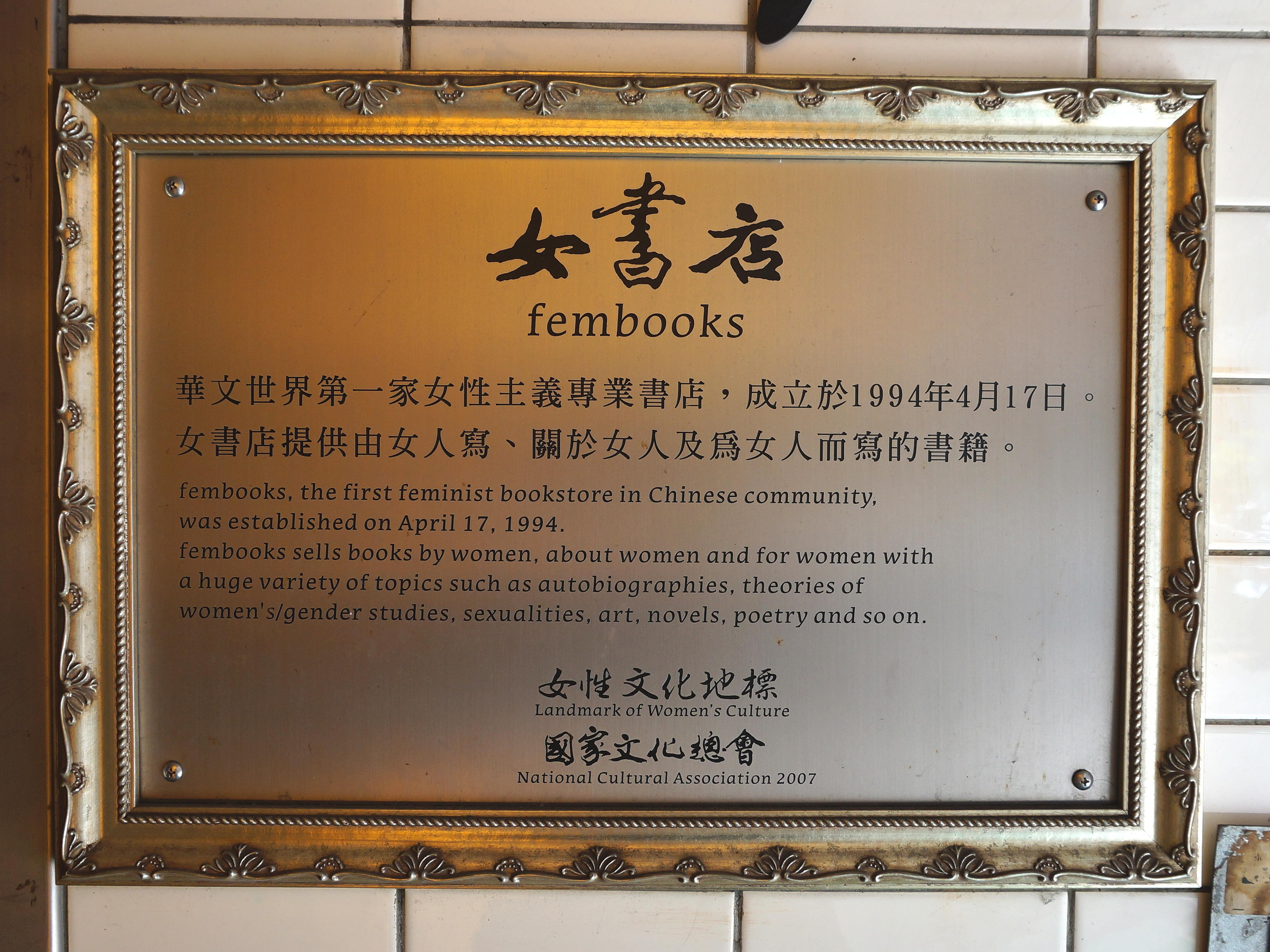 臺北市大安區新生南路三段56巷7號樓梯口，2007年國家文化總會頒贈女書店的女性文化地標銘板。